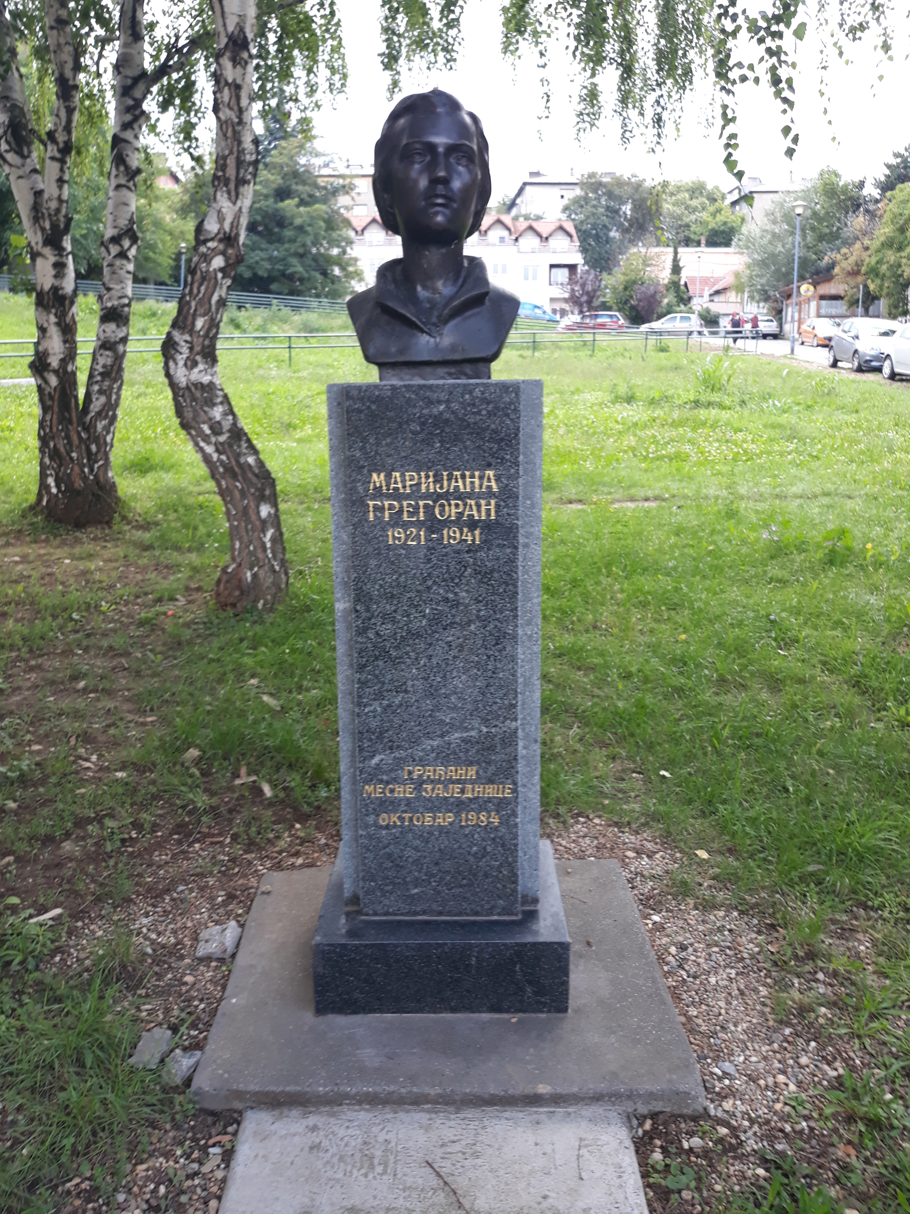 Биста Маријани Грегоран на Карабурми